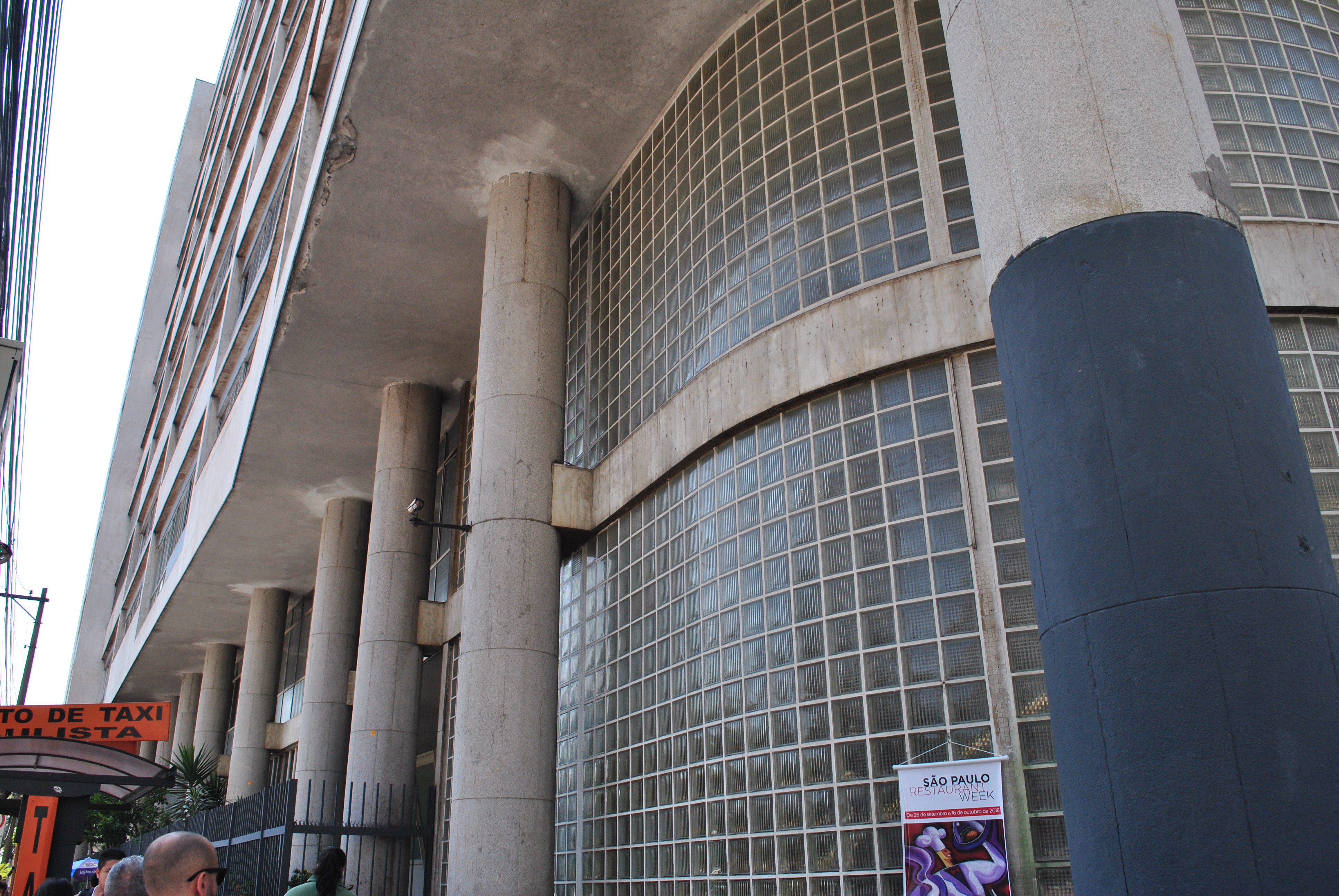 Detalhe arquitetônico do Edifício Anchieta. Face principal para a Avenida Paulista.